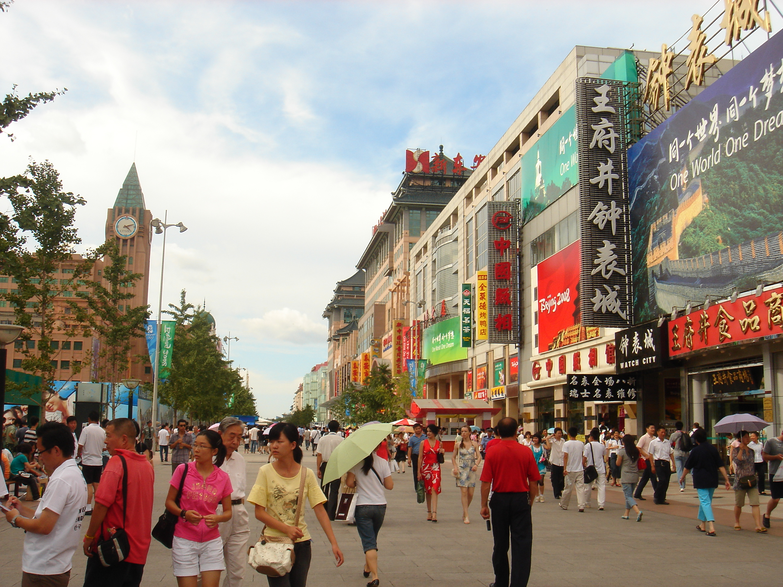 wangfujing street in Beijing